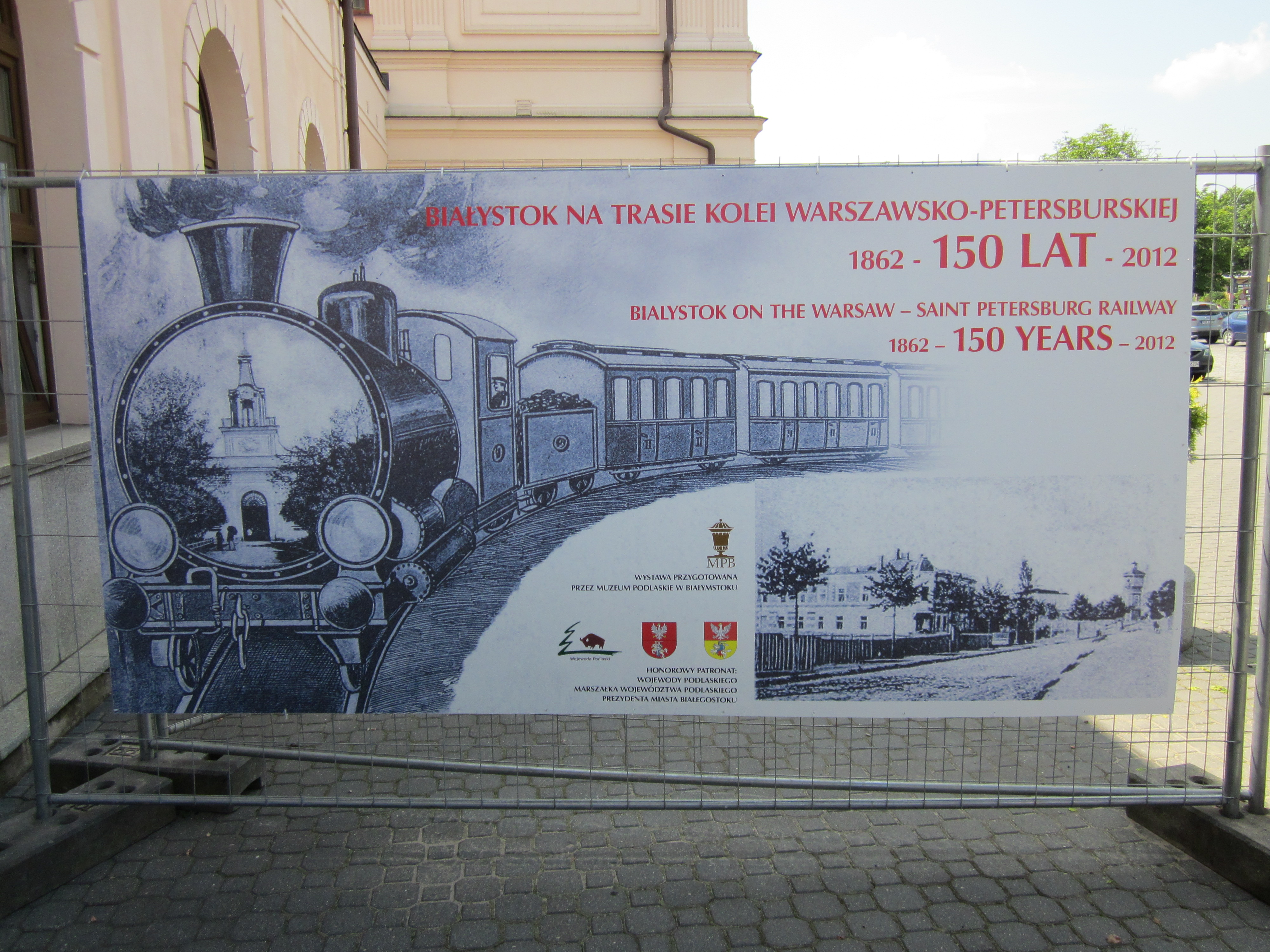 20 czerwca 2012 roku o godz. 11. 00 w Białymstoku została otworzona wystawa plenerowa z okazji 150 rocznicy uruchomienia Drogi Żelaznej Petersbursko –Warszawskiej. Dokładnie 18 maja 1862 roku uruchomiono próbny pociąg osobowy i towarowy na odcinku Warszawa-Białystok. Przejechał min. przez stacje Wołomin, Tłuszcz, Łapy. Dnia 18 września 1862 r. ruszyła maszyna jak wół ociężale... i ze stacji kolejowej na warszawskiej Pradze odjechał pierwszy płatny pociąg osobowy. Przemknął przez Białystok, Wilno. Po 38 godzinach dojechał do Petersburga, pokonując 1000 km. A całą linię kolei Warszawsko –Petersburskiej oficjalnie 15 grudnia 1862 r.